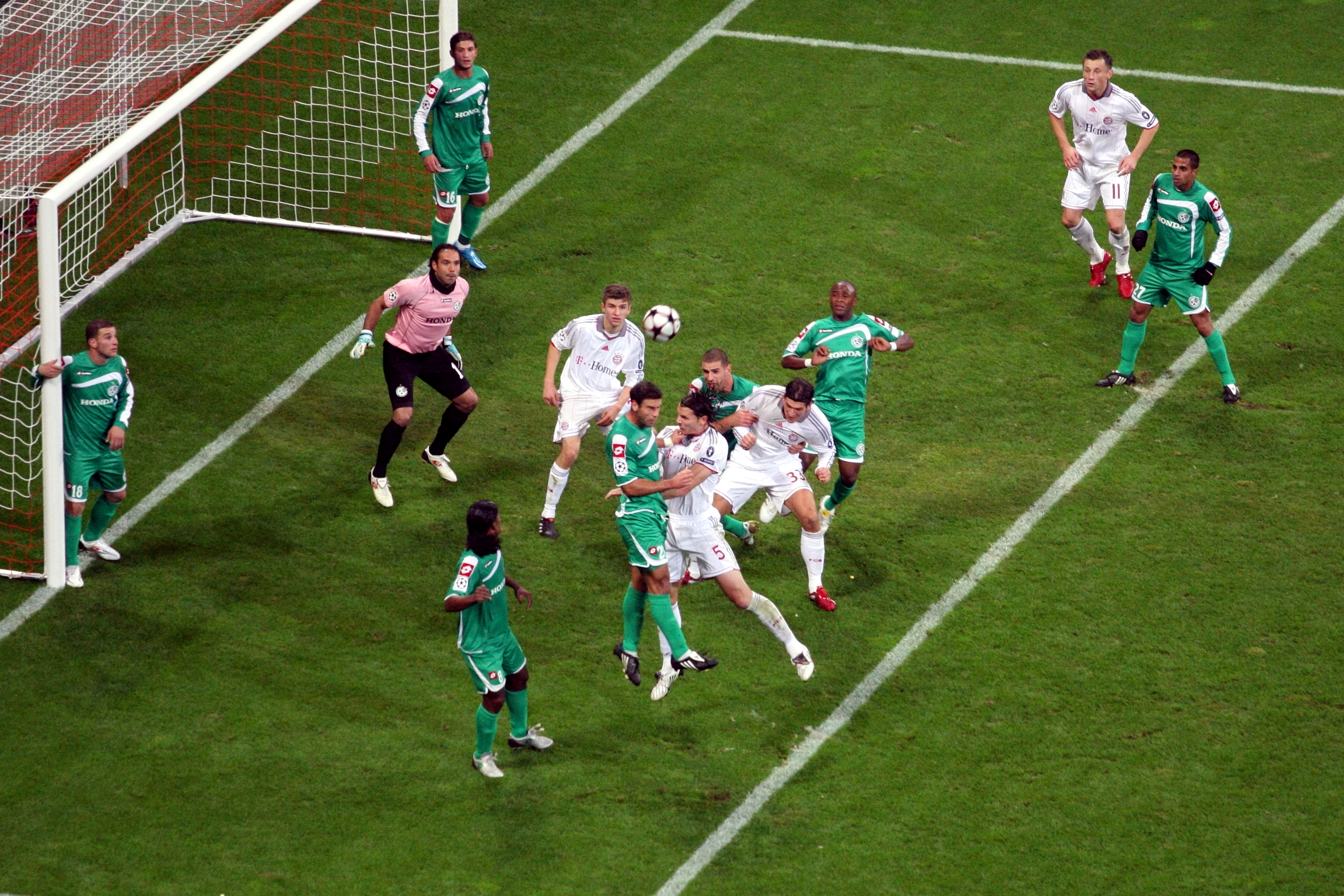 UEFA Champions Leauge